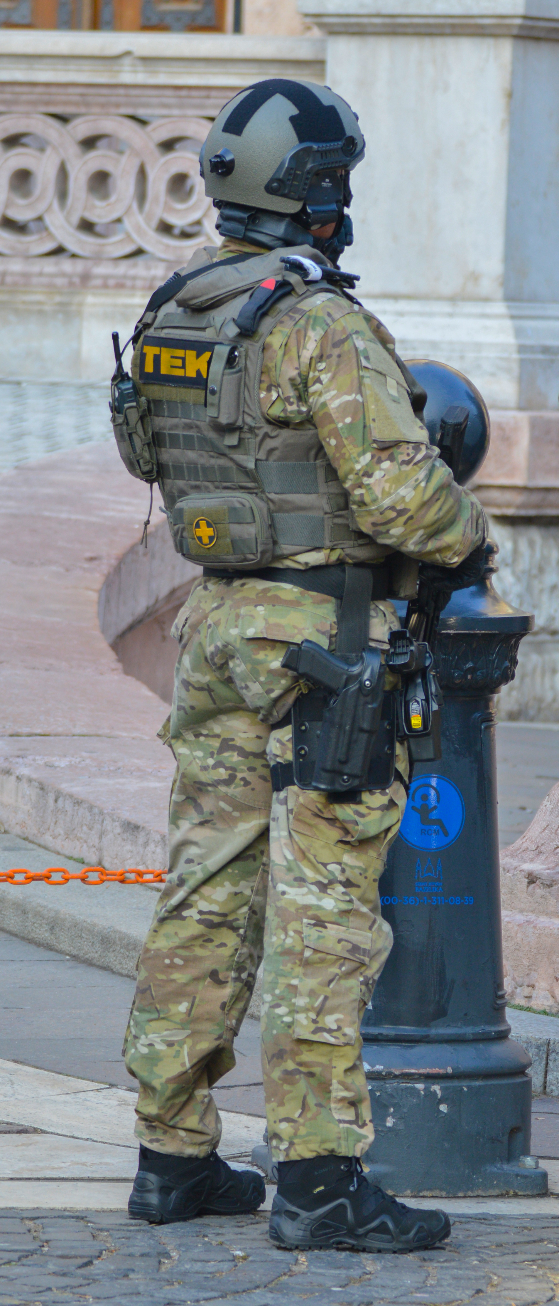 TEK munkatársa